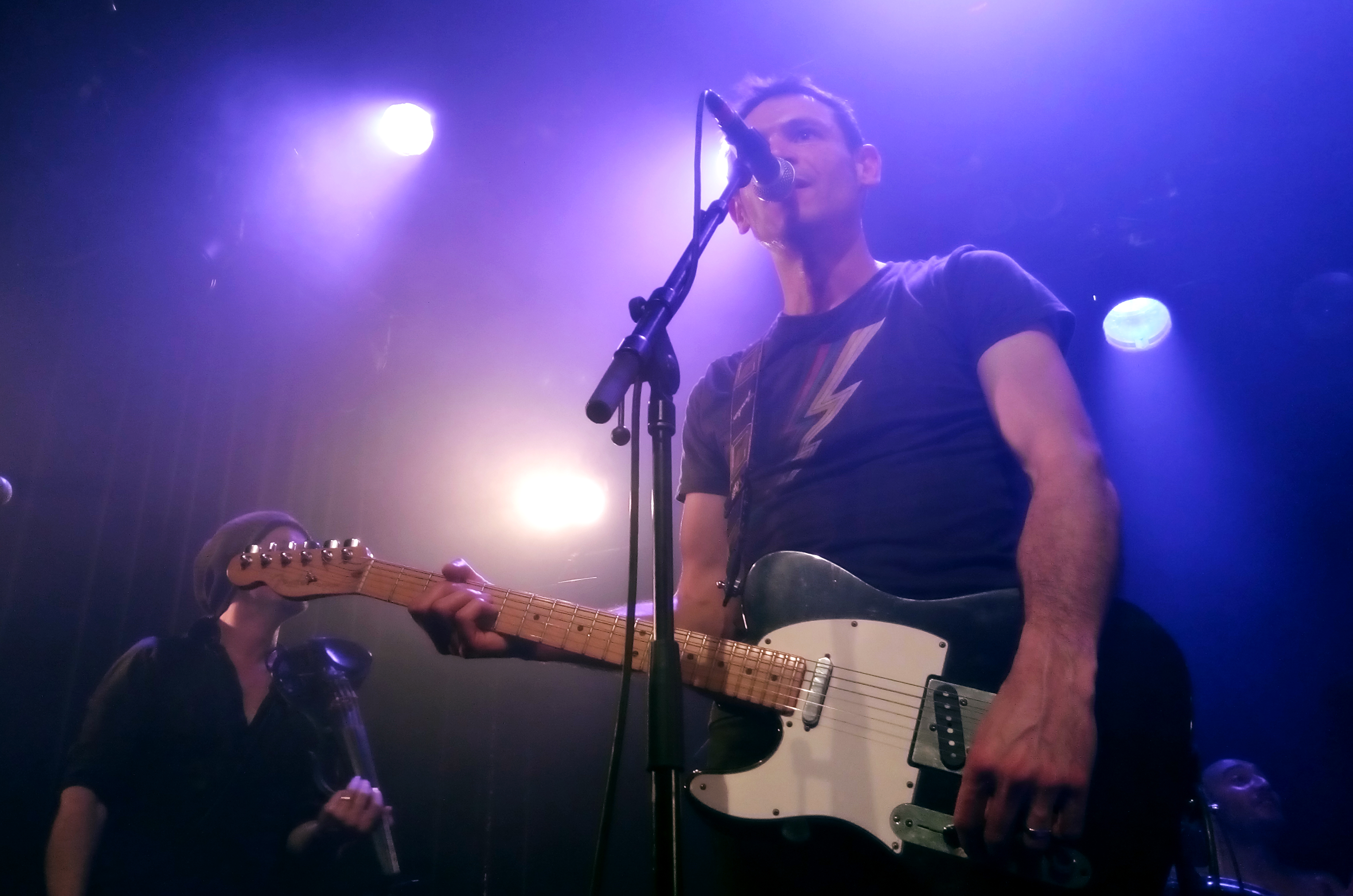 Concert unique de Tri Bleiz Die, dix ans après l'arrêt du groupe, le 8 janvier 2016 au Ferrailleur à Nantes.